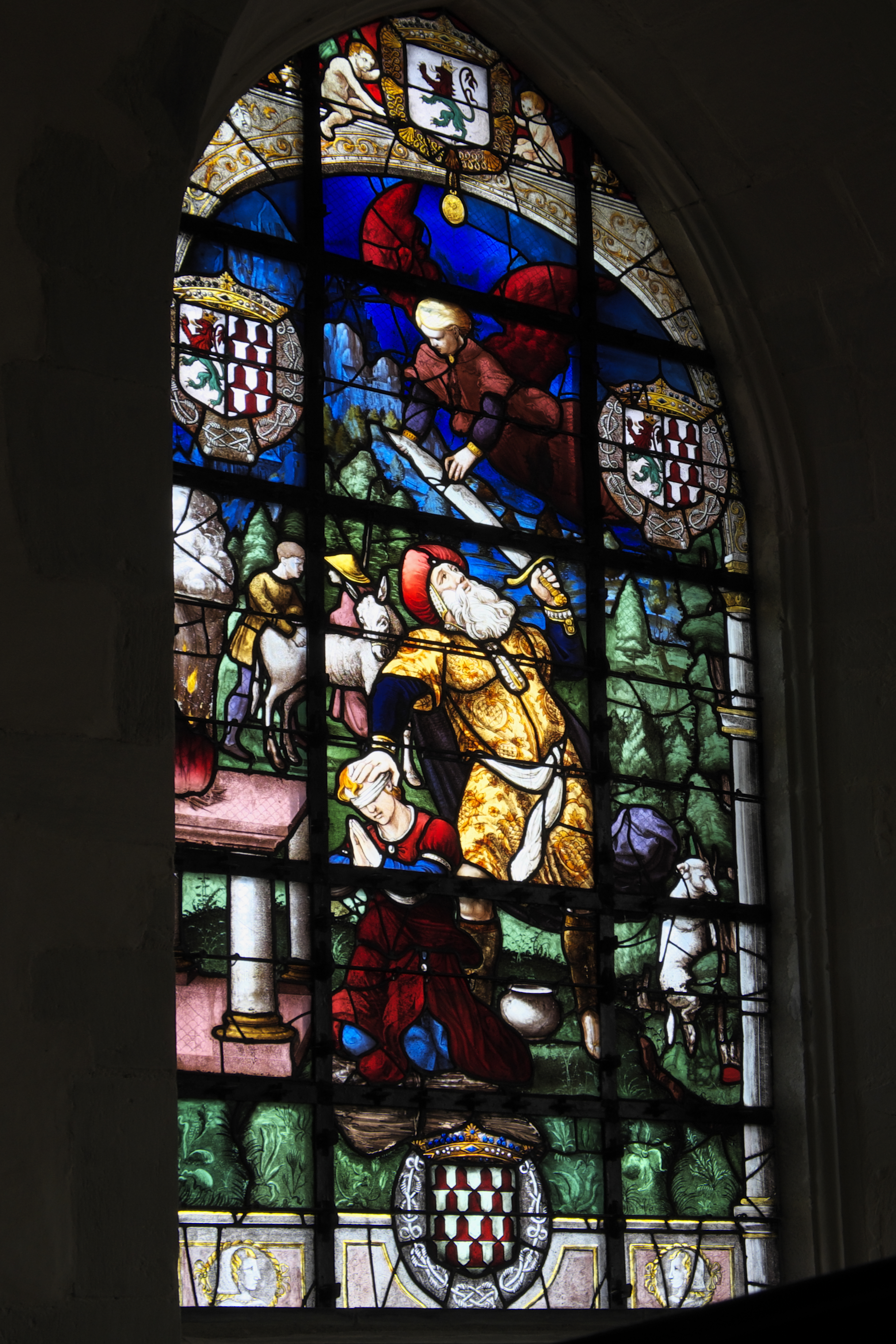 Fenster des Opferung Isaaks (Baie 2) in der Kirche Sainte-Marie-Madeleine, der ehemaligen Stiftskirche Notre-Dame, in Champeaux im Département Ille-et-Vilaine (Region Bretagne/Frankreich), Bleiglasfenster um 1595; mit Wappen und Alllianzwappen der Familien Épinay und Scépeaux This object is classé Monument Historique in the base Palissy, database of the French furniture patrimony of the French ministry of culture, under the references PM35000835 and IM35001822.